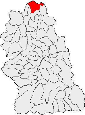 Categorie:Hărţi ale judeţului Hunedoara